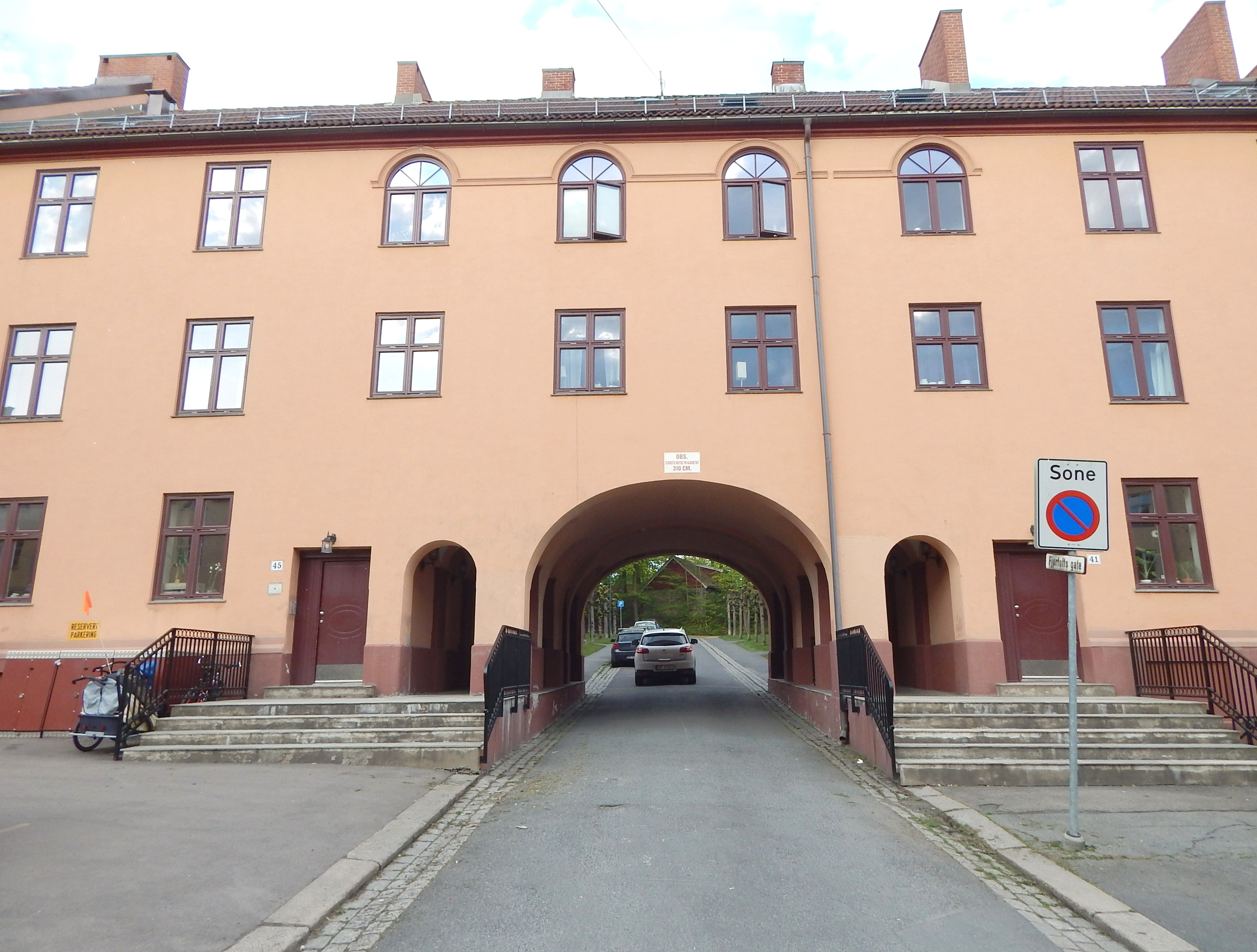 Fjørtofts gate går gjennom en portal i husrekken langs Stockfleths gate.